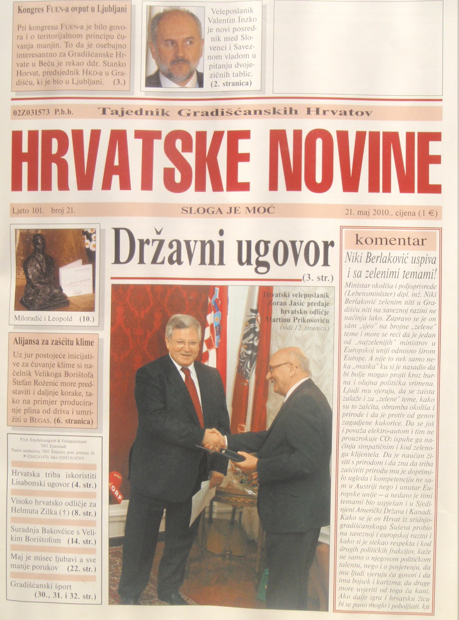 Kroatische Wochenblatt "Hrvatske Novine" aus Burgenland